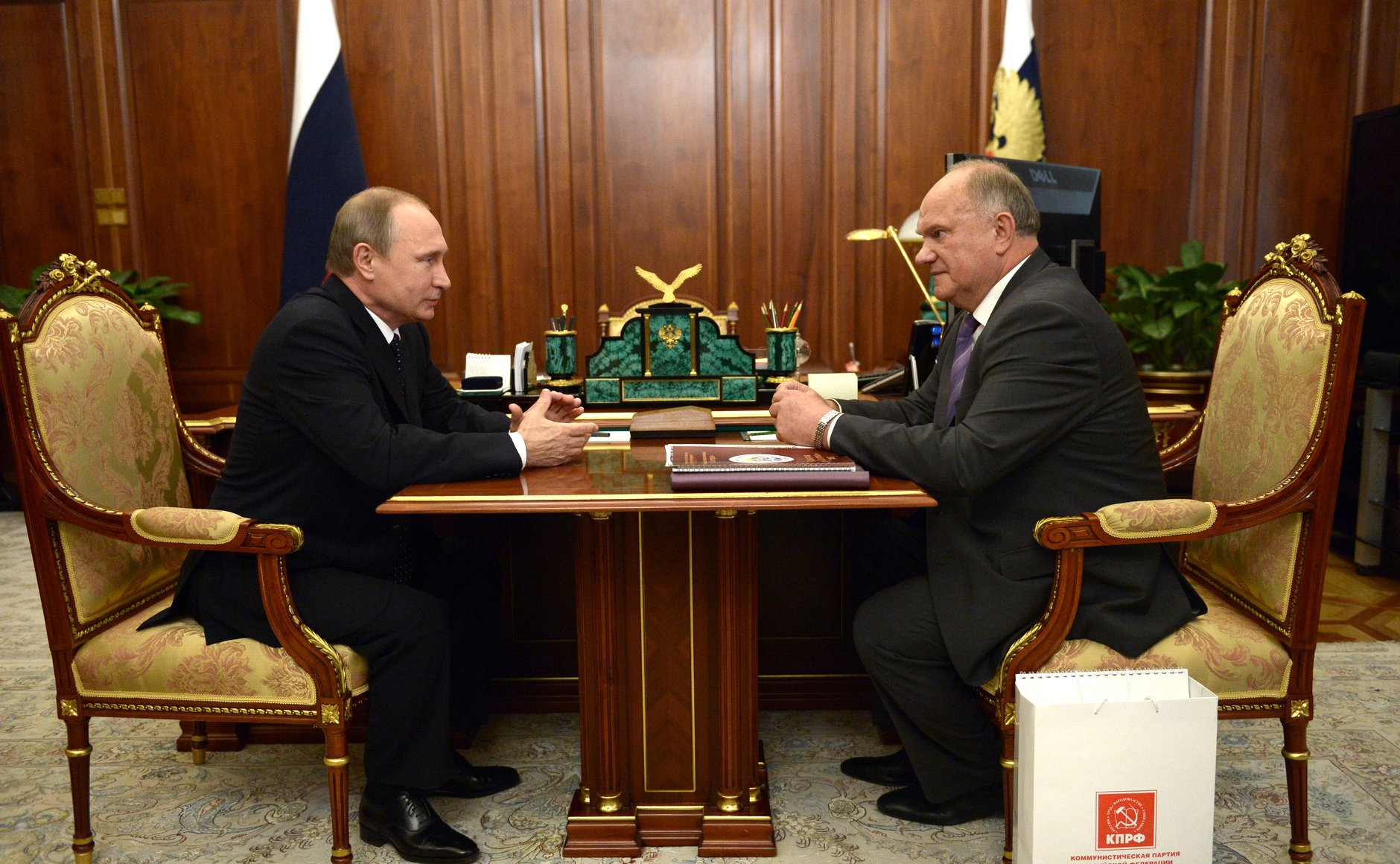 Встреча президента России Владимира Путина с руководителем фракции Коммунистической партии Российской Федерации в Государственной Думе, председателем Центрального комитета КПРФ Геннадием Зюгановым